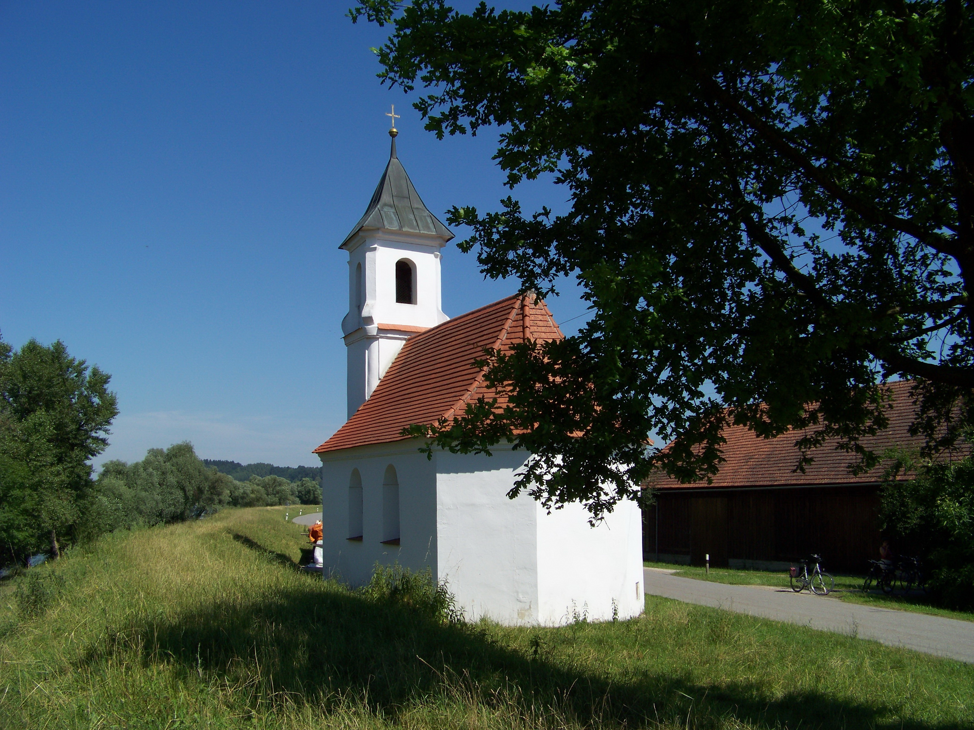 Lenzing (Niederwinkling). Katholische Filialkirche St. Koloman, spätbarock, 1761 erneuert; mit Ausstattung.